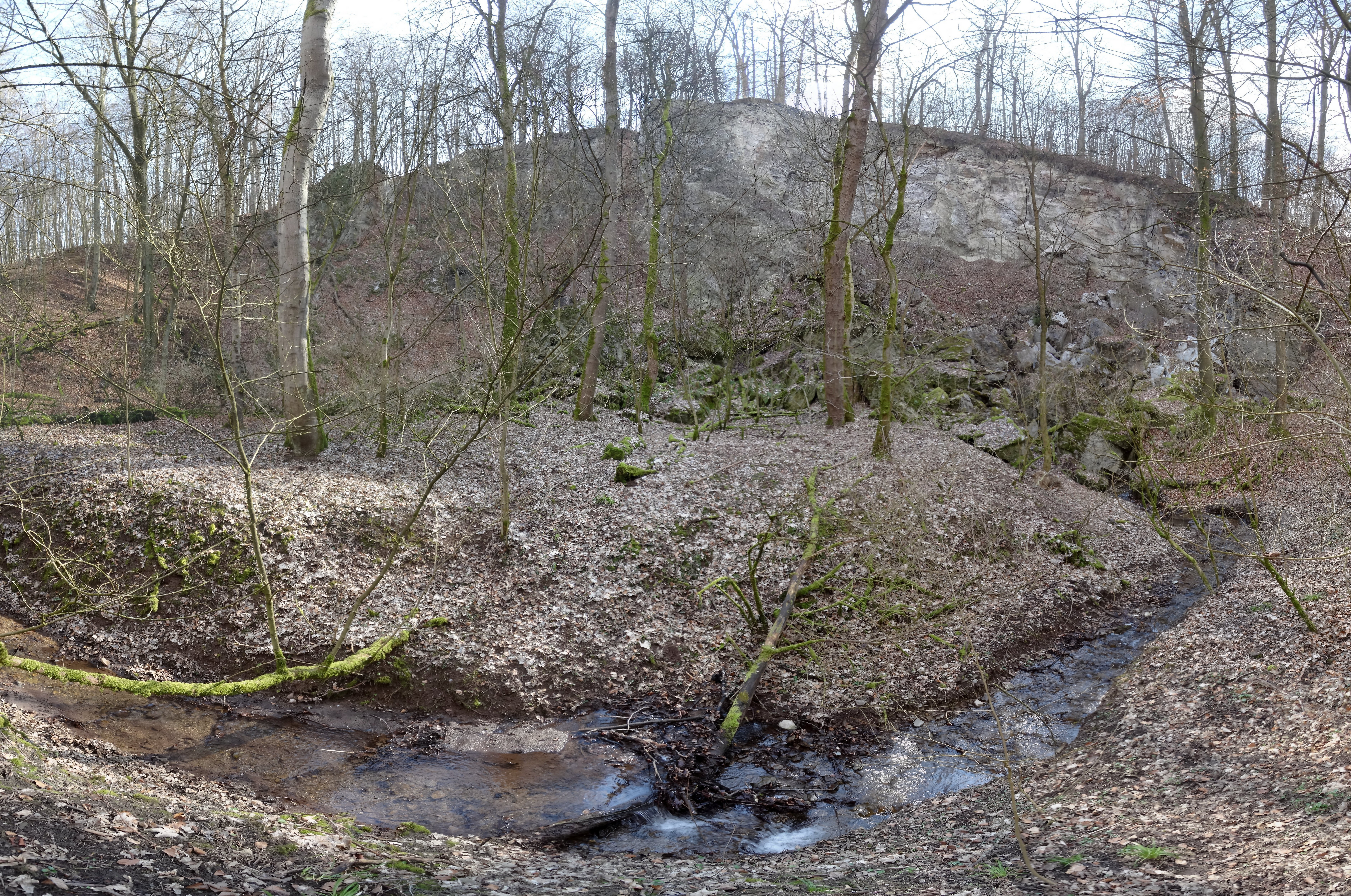 Die Dinsterbachschwinde zwischen Questenberg und Hainrode März 2016